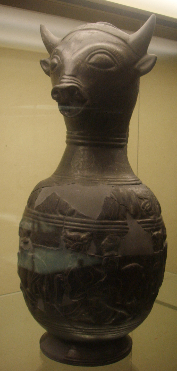 Oinochoe in bùcchero con testa di toro, da Chiusi, prima metà del VI sec. a.C. Museo archeologico di Firenze.